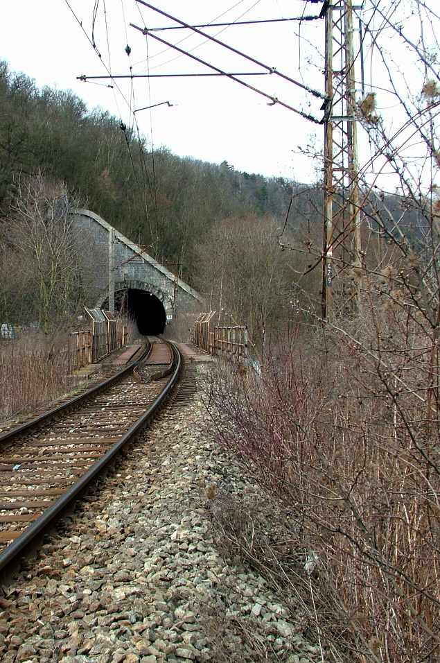 Tunel v Malé Chuchli, vjezd od jihu.